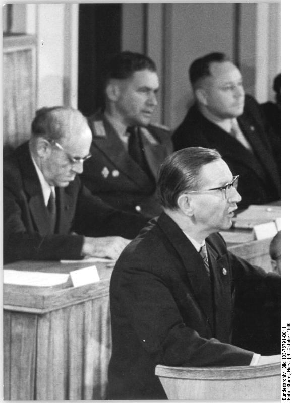 Zentralbild/Sturm- 4.10.1960 15. Sitzung der Volkskammer der DDR Im In- und Ausland mit größtem Interesse erwartet ist die Volkskammer der Deutschen Demokratischen Republik am 4.10.1960 um 11.00 Uhr zu ihrer 15. Sitzung zusammengetreten. Auf der Tagesordnung stehen eine Erklärung des Staatsrates der Republik, das "Gesetz über die Anpassung von gesetzlichen Bestimmungen an die Bildung des Staatsrates der Deutschen Demokratischen Republik" in erster und zweiter Lesung sowie Anzeigen des Ausschusses für Eingaben der Bürger. UBz.: Als Sprecher der NDFD-Fraktion wandte sich der Abgeordnete Siegfried Dallmann mit dem Apell an die Menschen in Westdeutschland, nicht ein weiteres Mal den Militaristischen Kräften zu folgen.